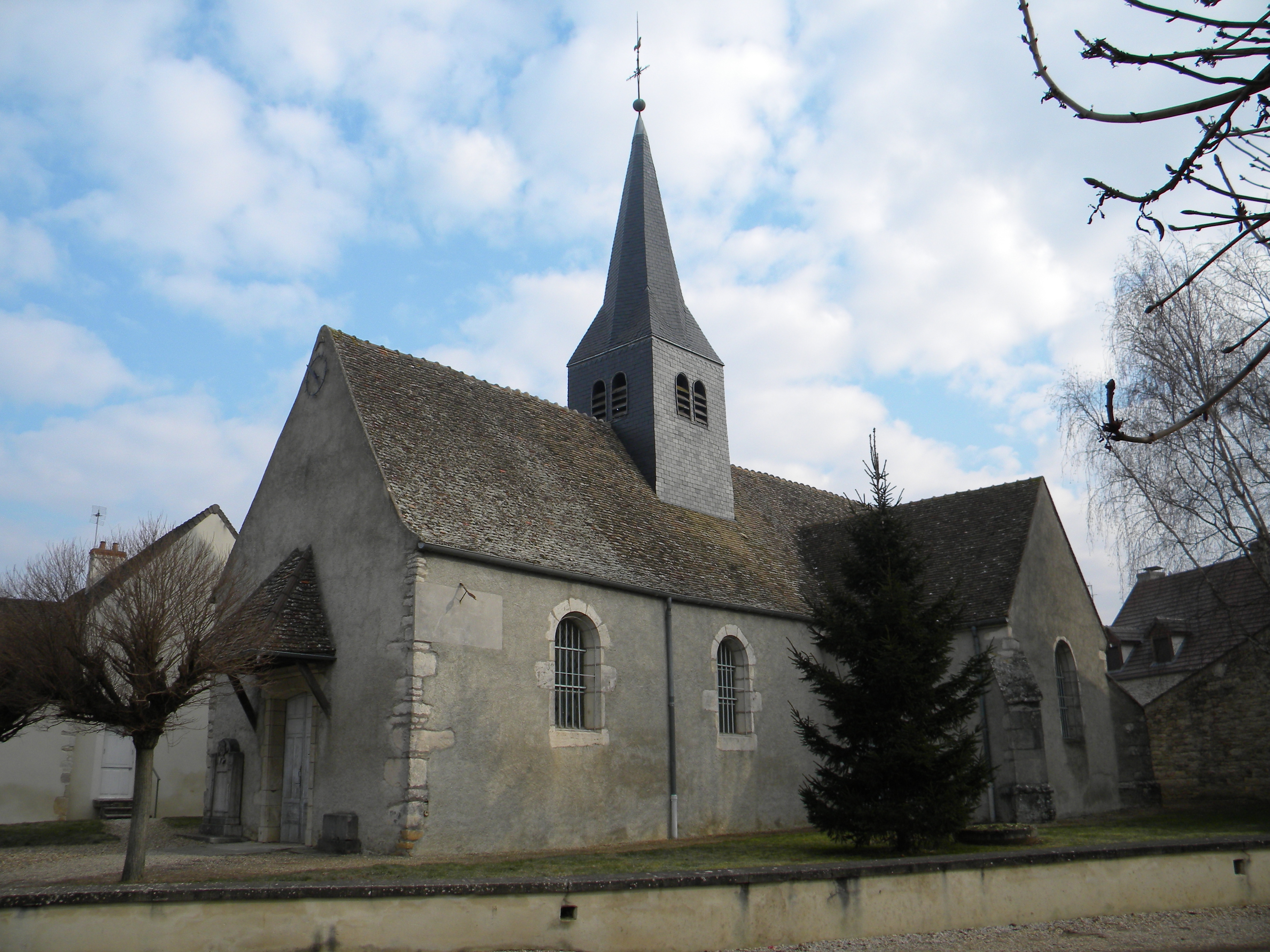 Église saint Pierre et Paul à Corcelles-les-Arts